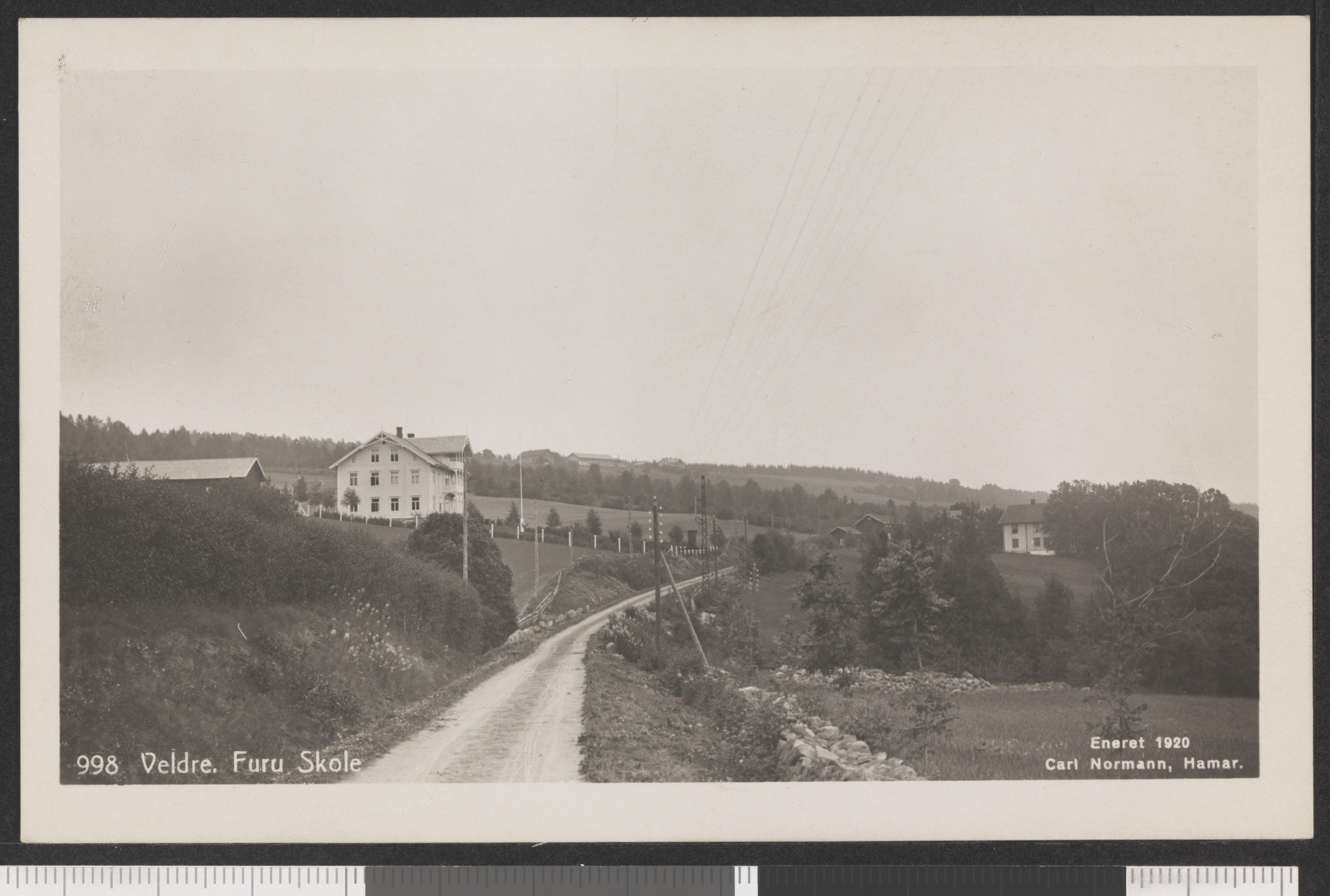 Bildet er hentet fra Nasjonalbibliotekets bildesamling Brumundal,Furu skole,Veldre, Ringsaker, Hedmark